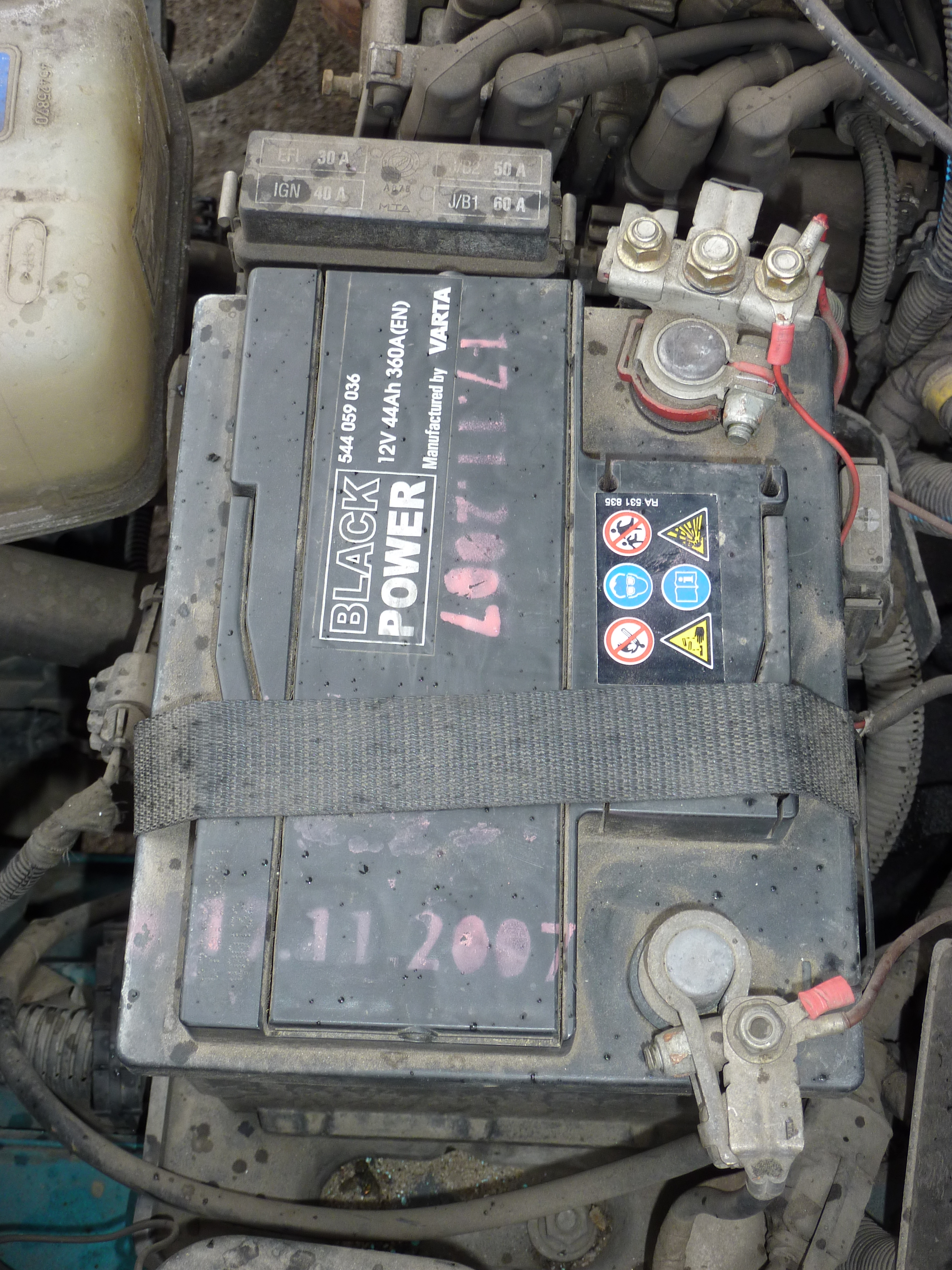 akumulator samochodowy zainstalowany w samochodzie osobowym Fiat Siena